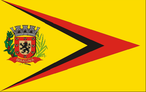 Bandeira de Brauna